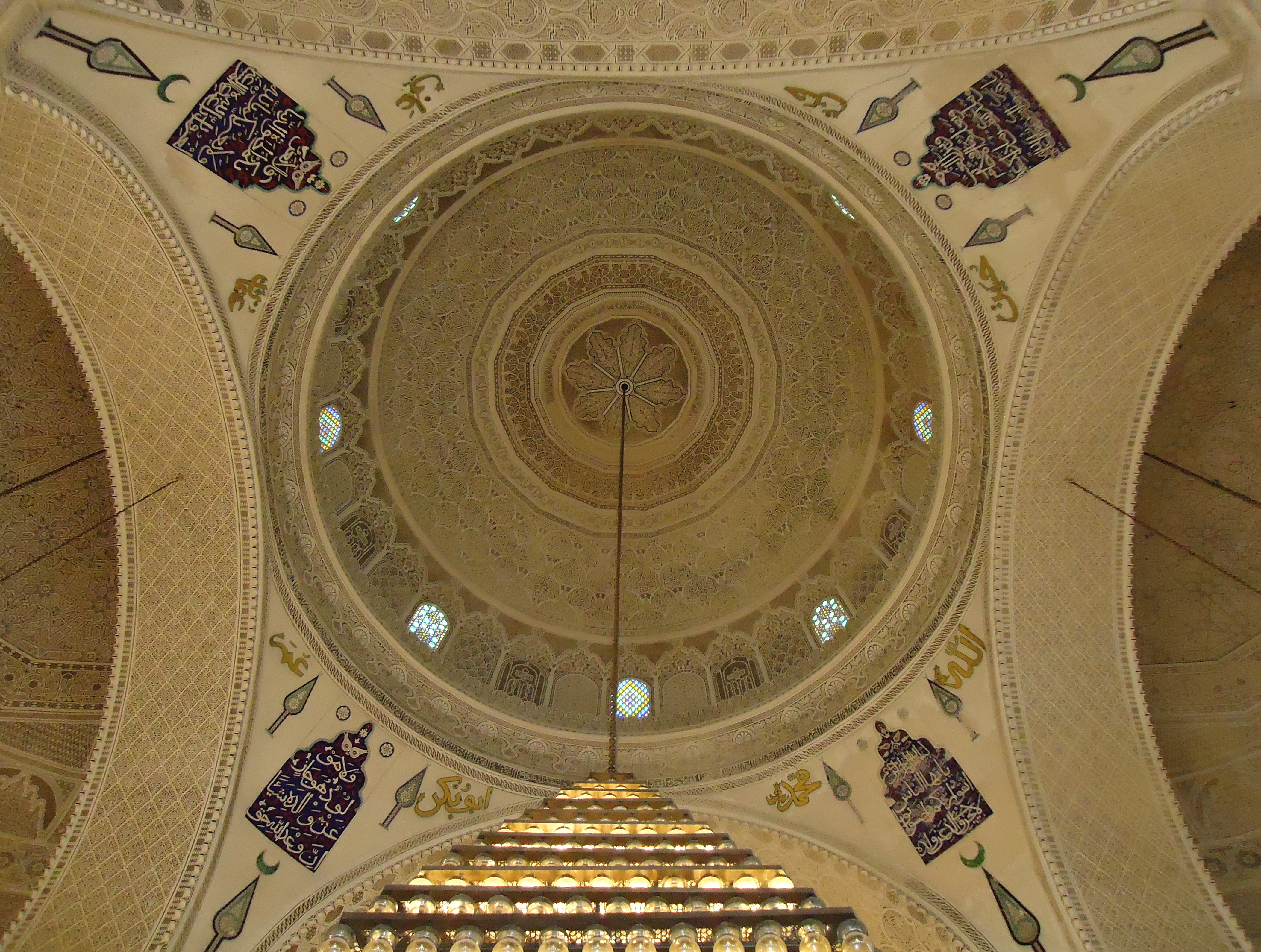 Intrados d'une coupole, Mosquée de Mohammed Bey, Tunis